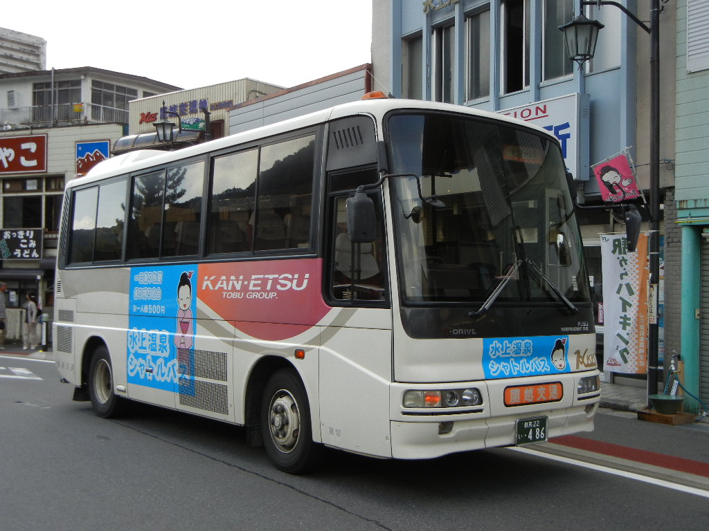 Minakami-Hotspring-Shuttle-Bus.JPG